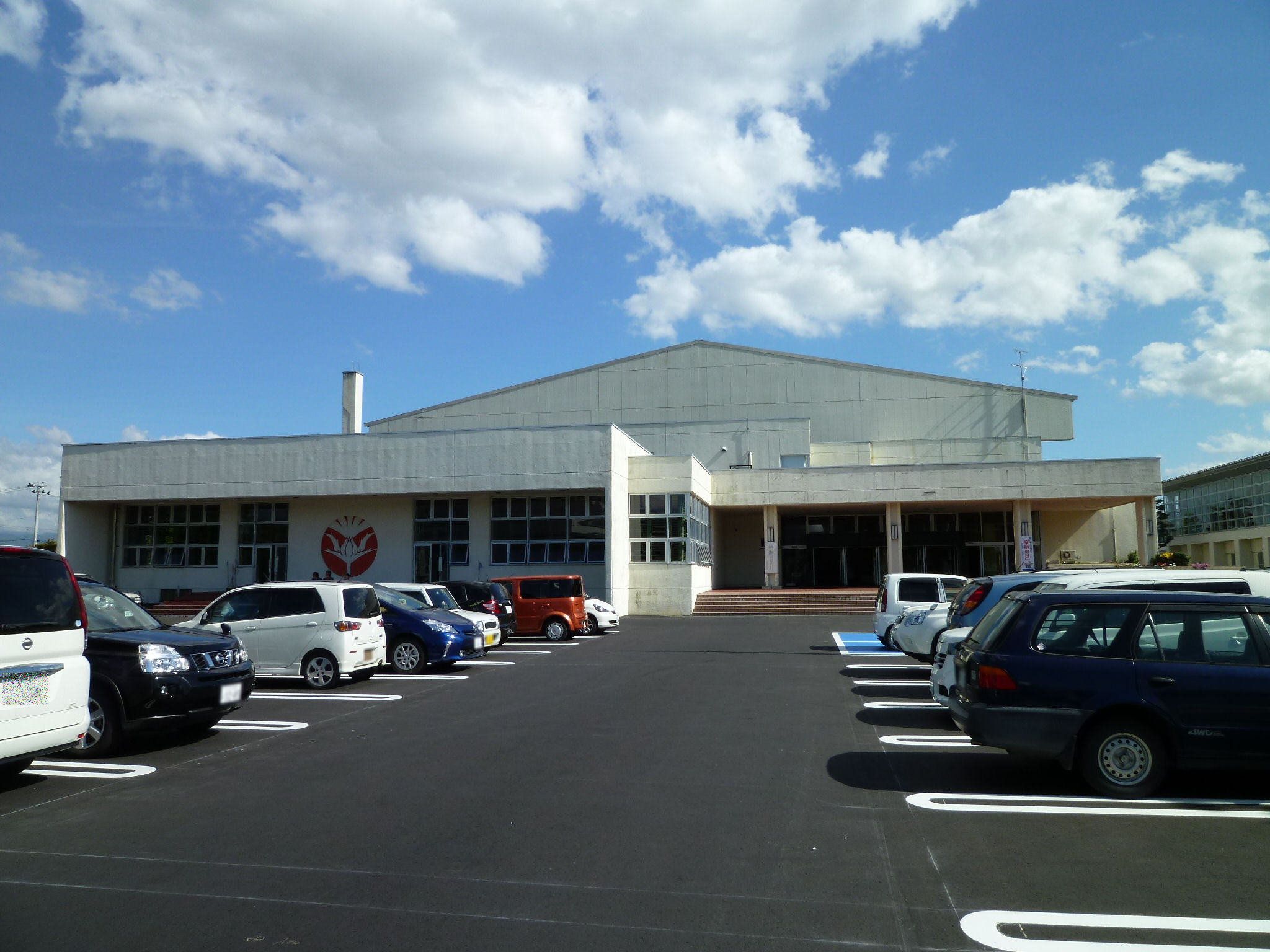 河北町民体育館（山形市河北町）